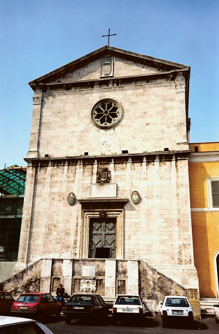 Chiesa di San Pietro in Montorio, Roma. Facciata. Picture by Torvindus.